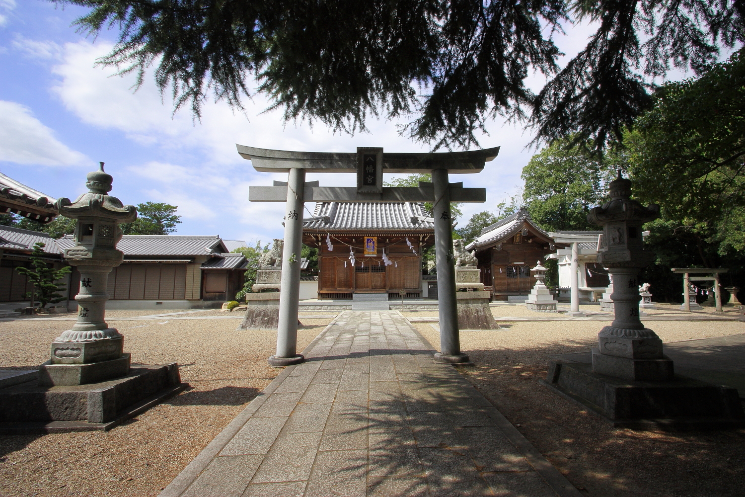 八幡宮境内（安城市安城町、2009年（平成21年）8月）